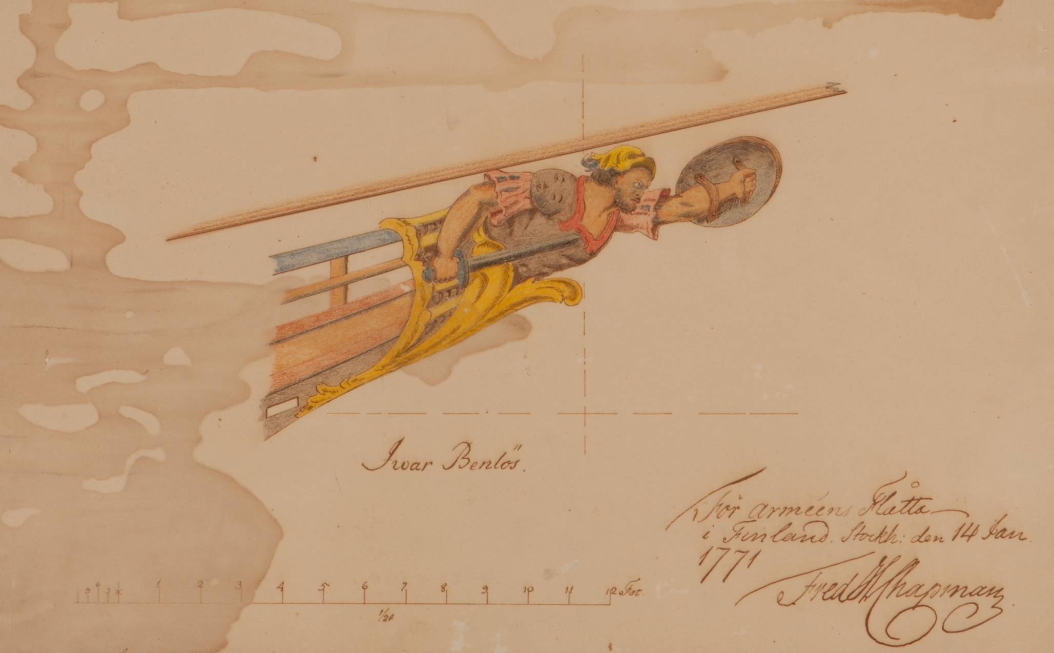 Ritning av galjon till fartyget Ivar Benlös i Arméns flotta. Målning från 1771.